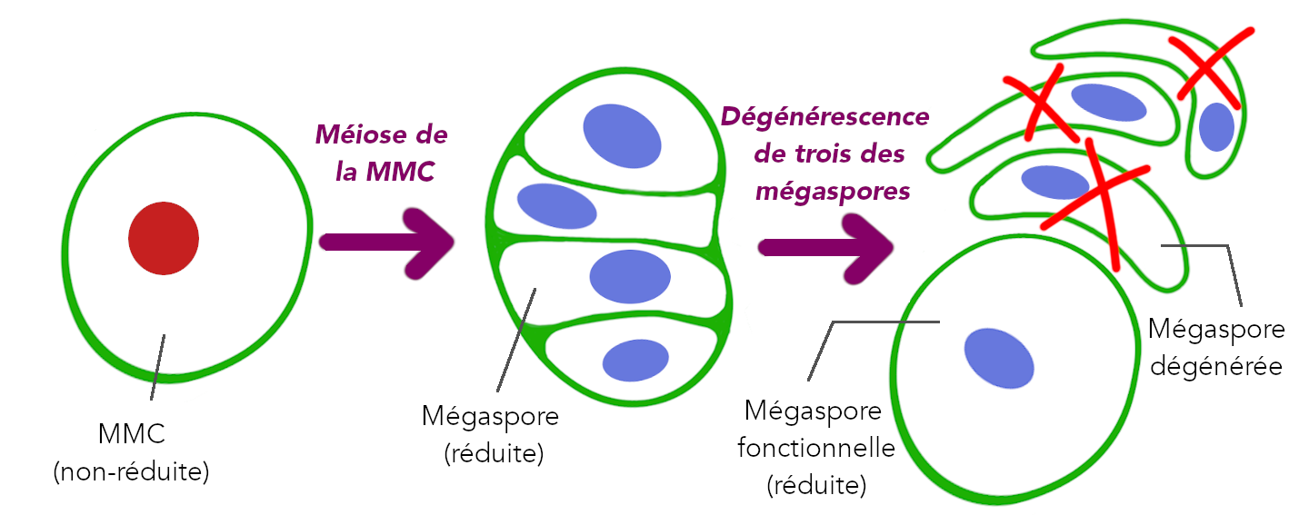 Mégasporogenèse : méiose de la MMC puis dégénerescence de trois des mégaspores formées